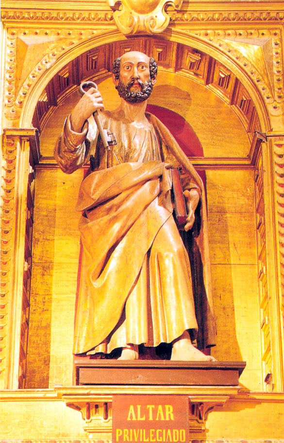 San Pedro. Catedral de Las Palmas.